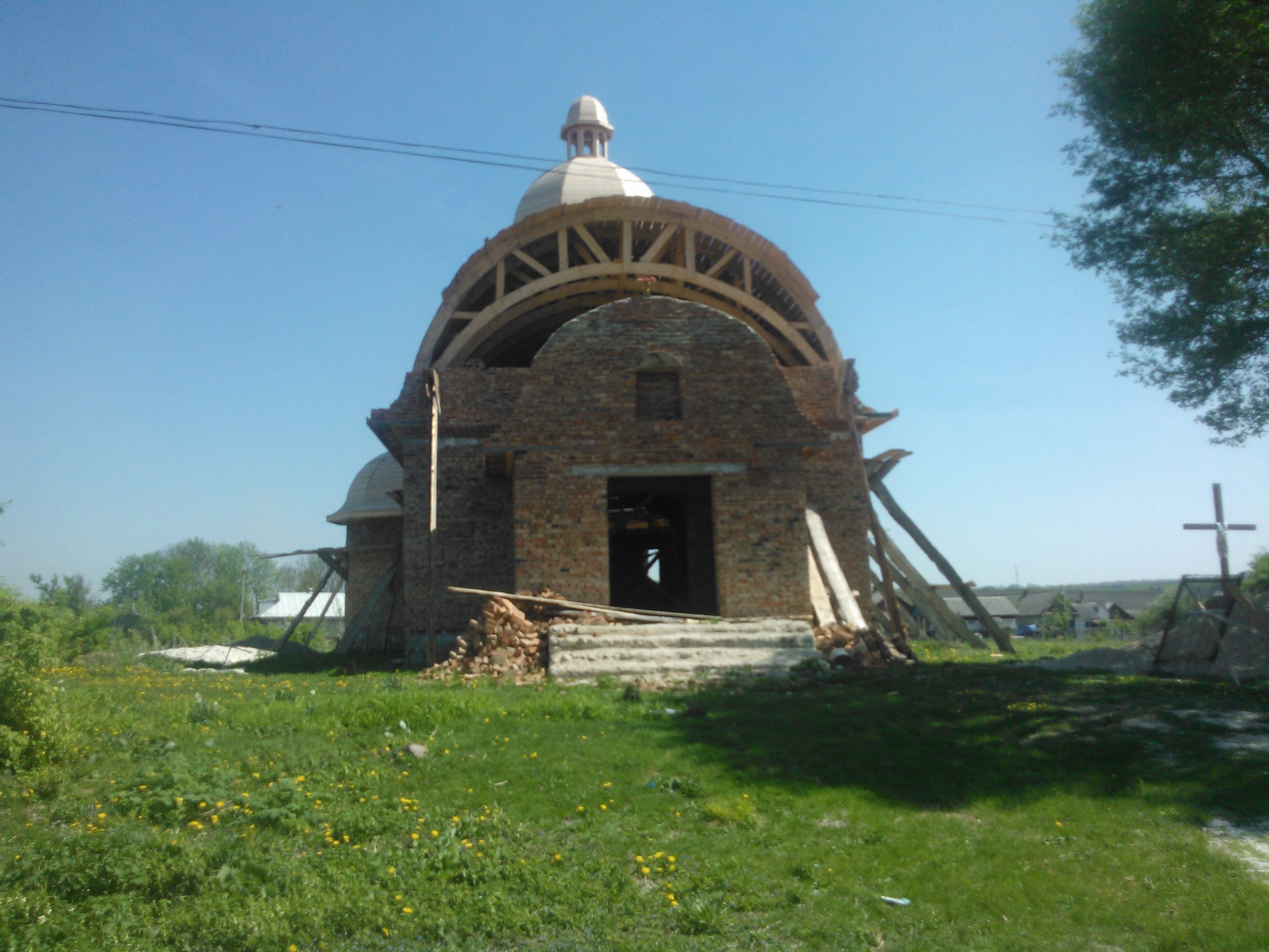 с. Бальківці Волочиського району Хмельницької області